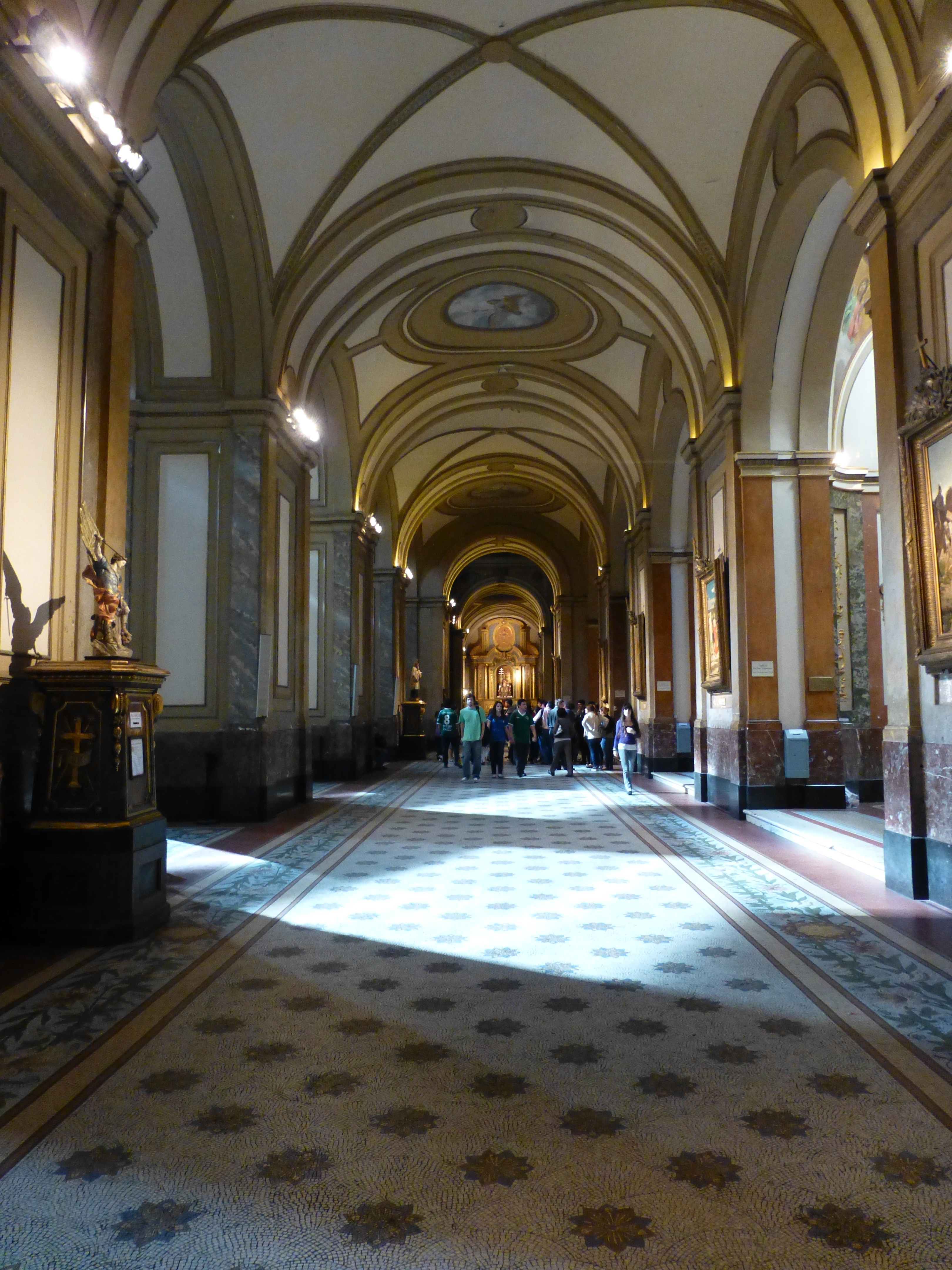 Catedral de la Ciudad de Buenos Aires